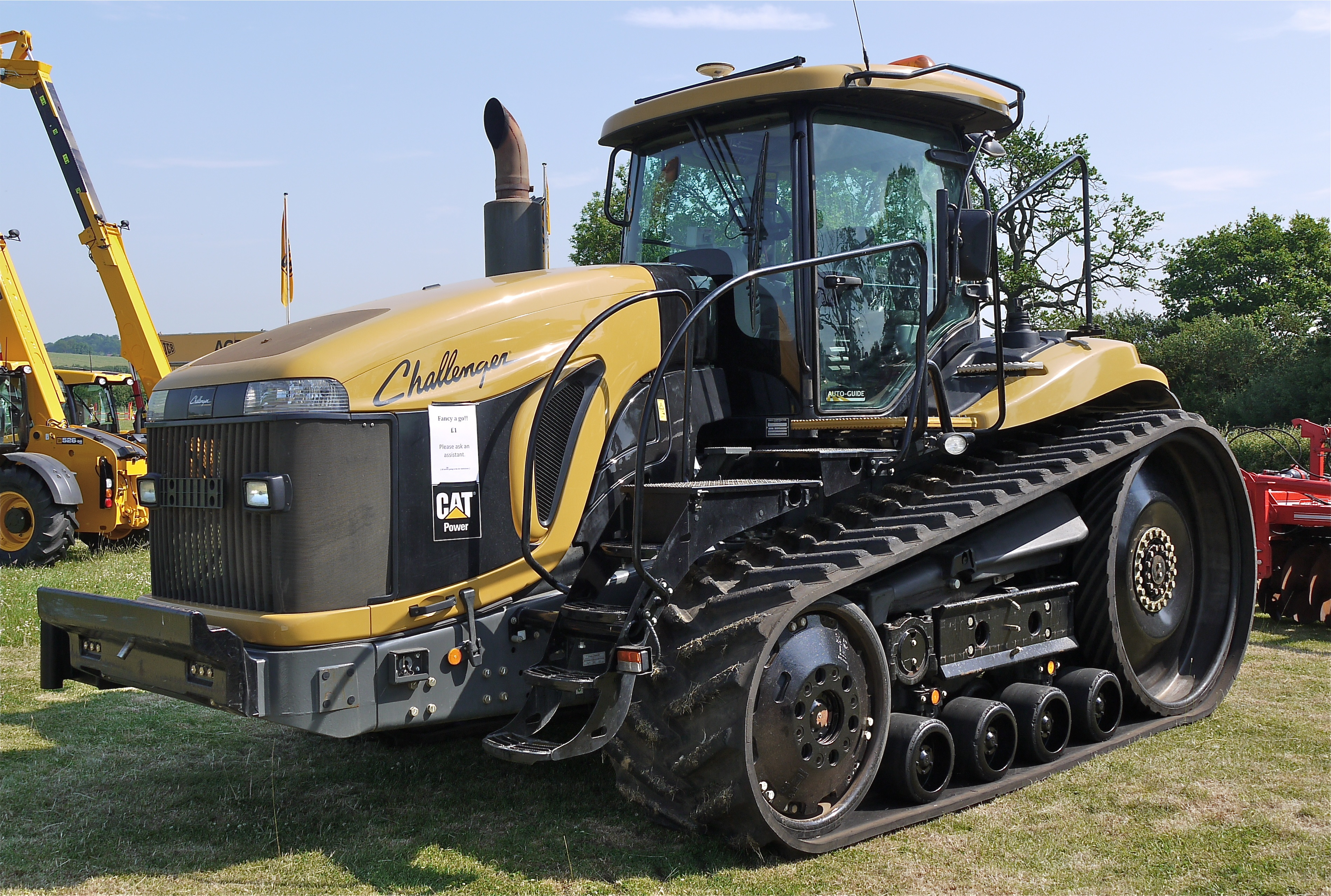 Panasonic G1 14-45 Lens